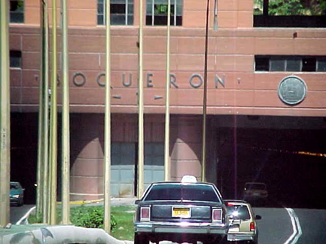 Autopista Caracas - La Guaira en el estado Vargas - Venezuela a un año de del deslave de diciembre de 1999 (2000)